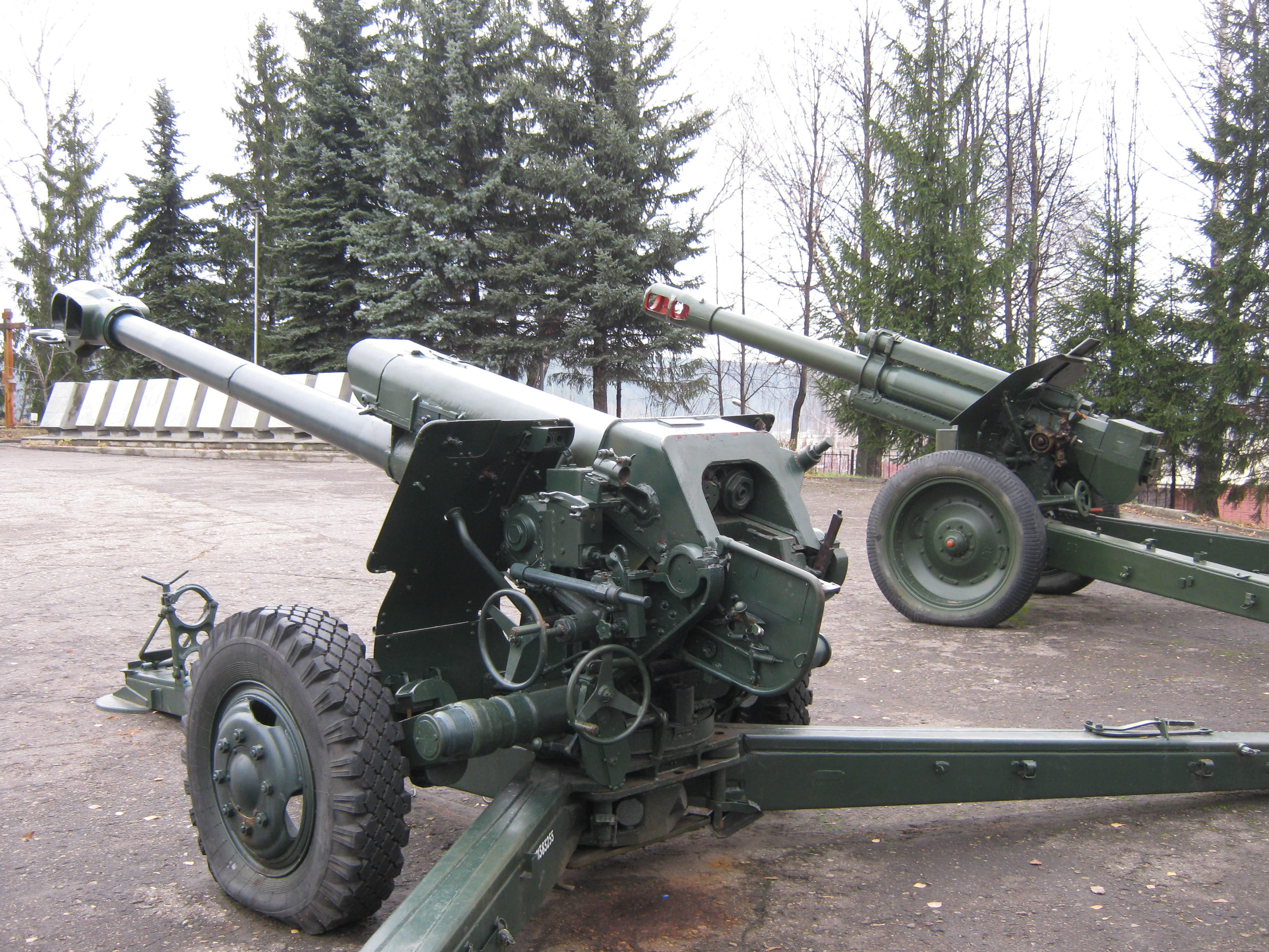 Артиллерийские пушки в Кузнецке